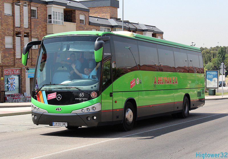 Línea 643 transcurriendo por Villanueva del Pardillo